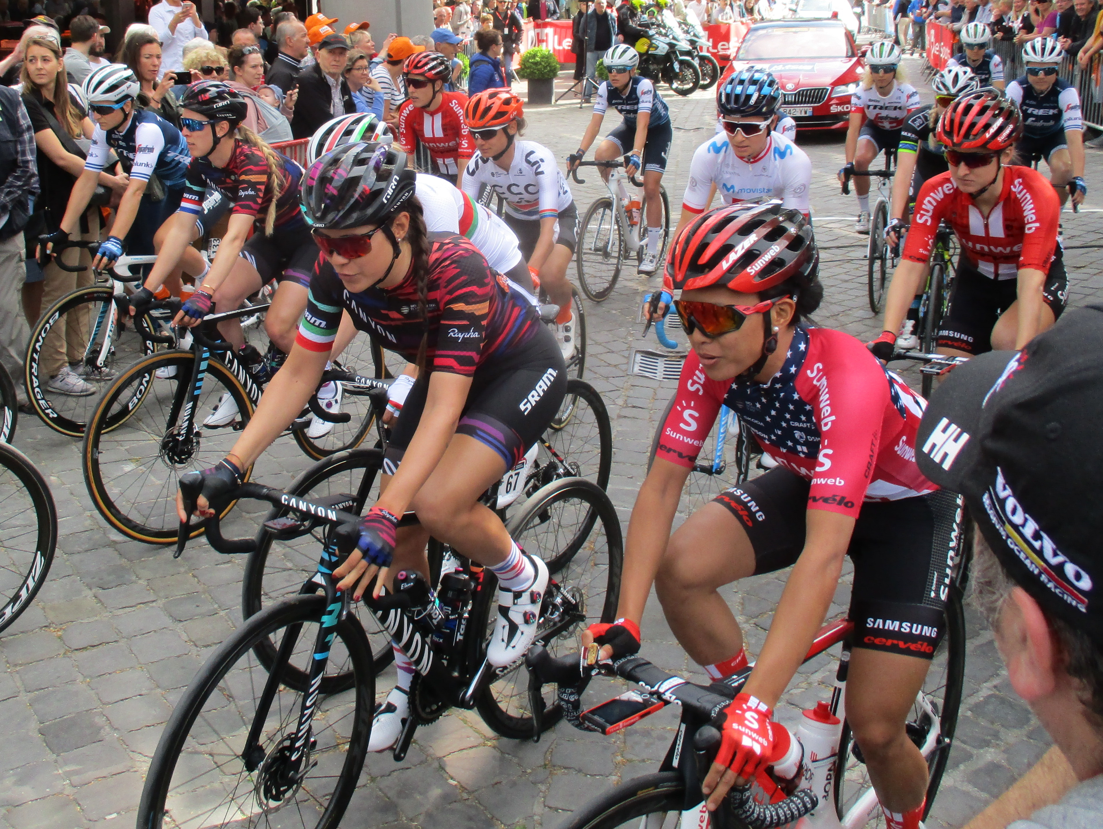 Start van de Waalse Pijl 2019 voor vrouwen in Huy